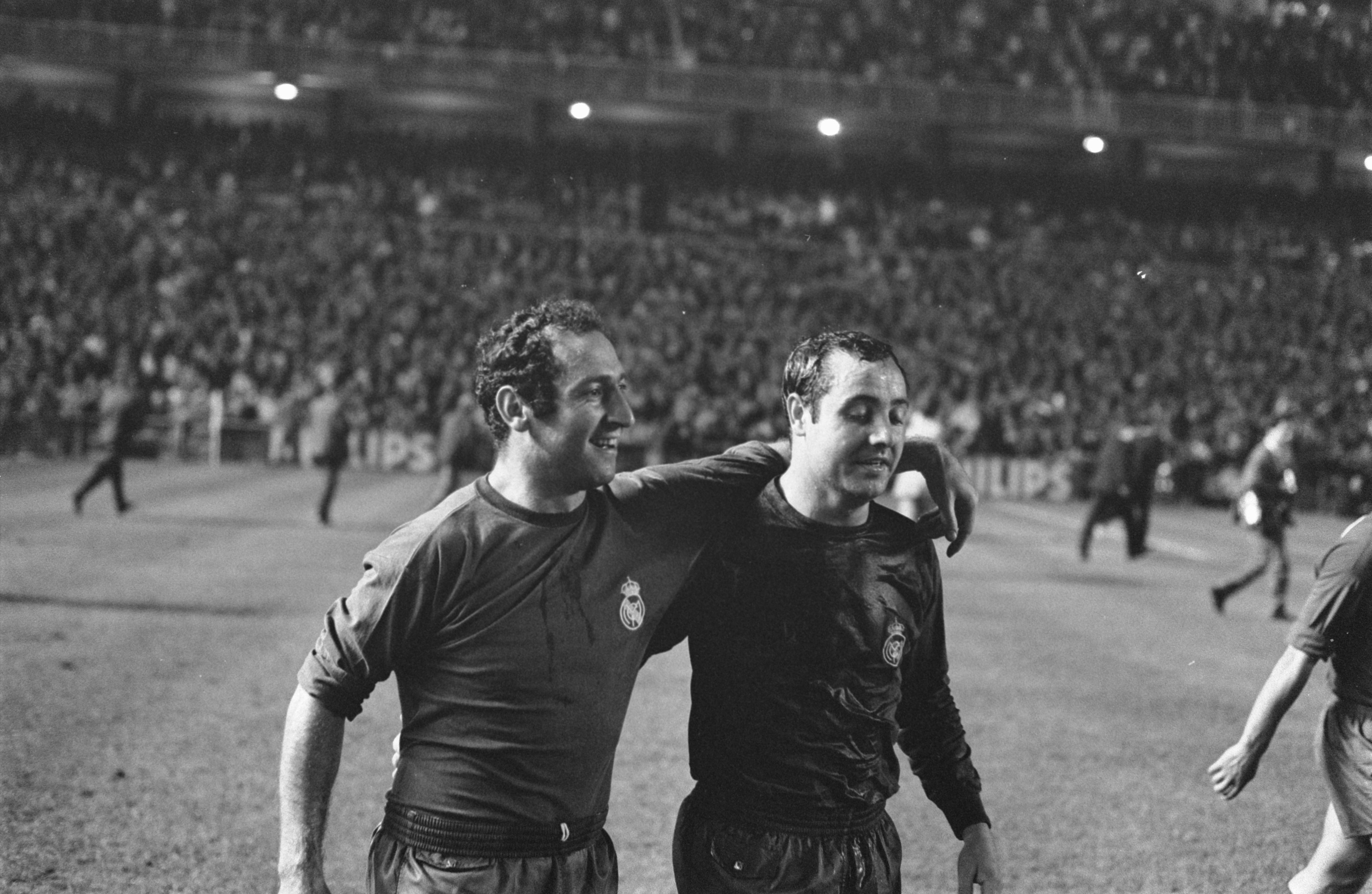 Collectie / Archief : Fotocollectie Anefo Reportage / Serie : [ onbekend ] Beschrijving : Real Madrid tegen Ajax 2-1. Gento (links) en Veloso die de doelpunten maakten Datum : 11 oktober 1967 Trefwoorden : sport, voetbal Instellingsnaam : Real Madrid Fotograaf : Kroon, Ron / Anefo Auteursrechthebbende : Nationaal Archief Materiaalsoort : Negatief (zwart/wit) Nummer archiefinventaris : bekijk toegang 2.24.01.05 Bestanddeelnummer : 920-7773